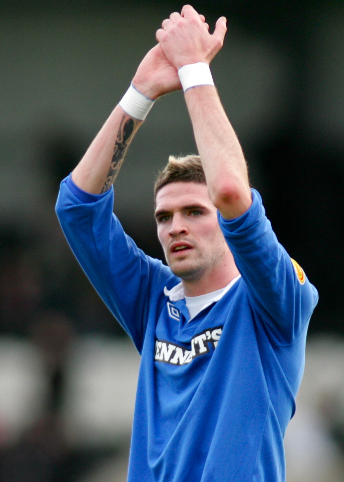 HI7Y0391